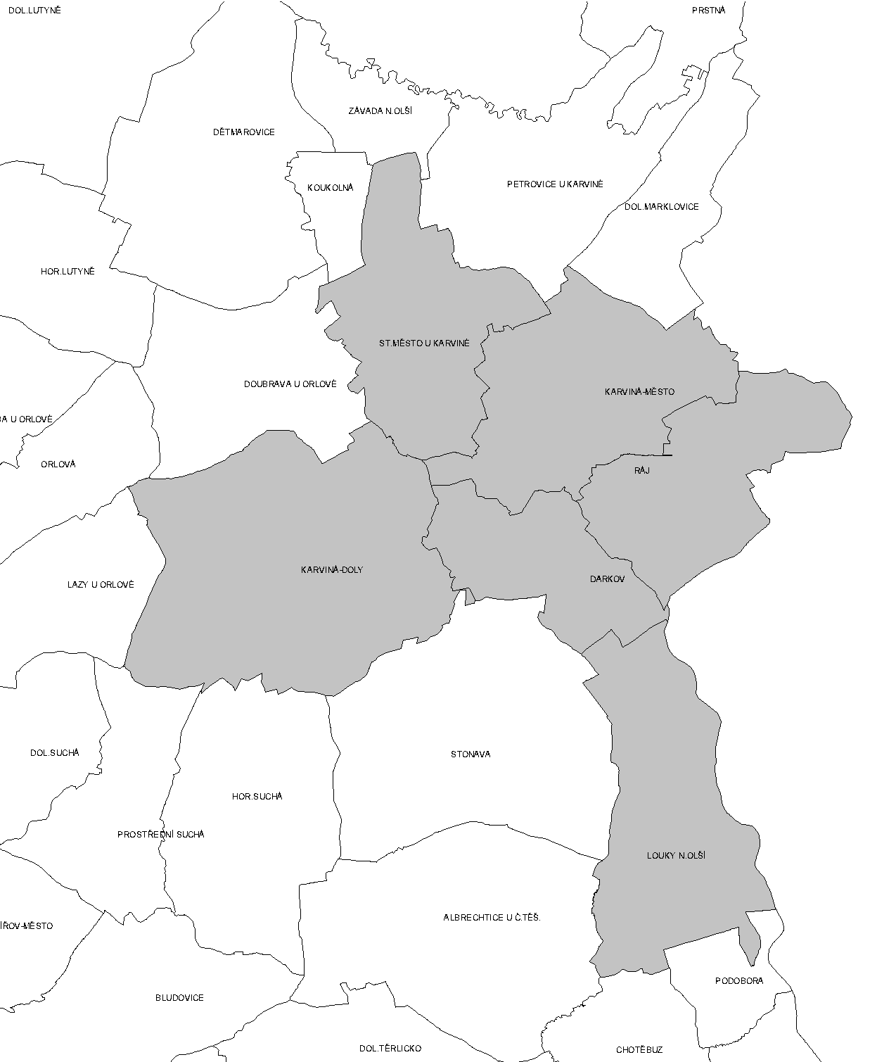 Katastrální území Karviné